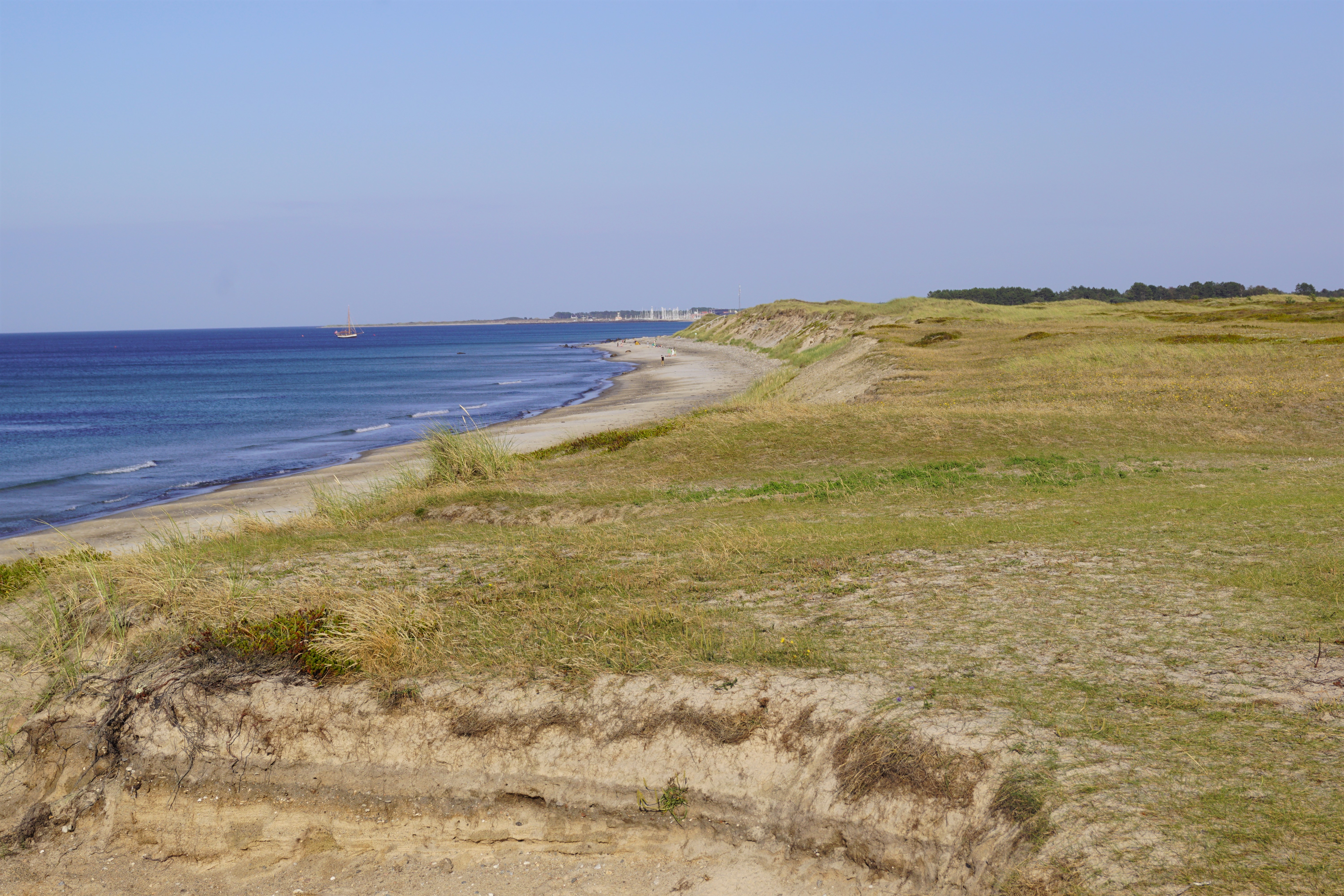 Nordmarken set mod øst